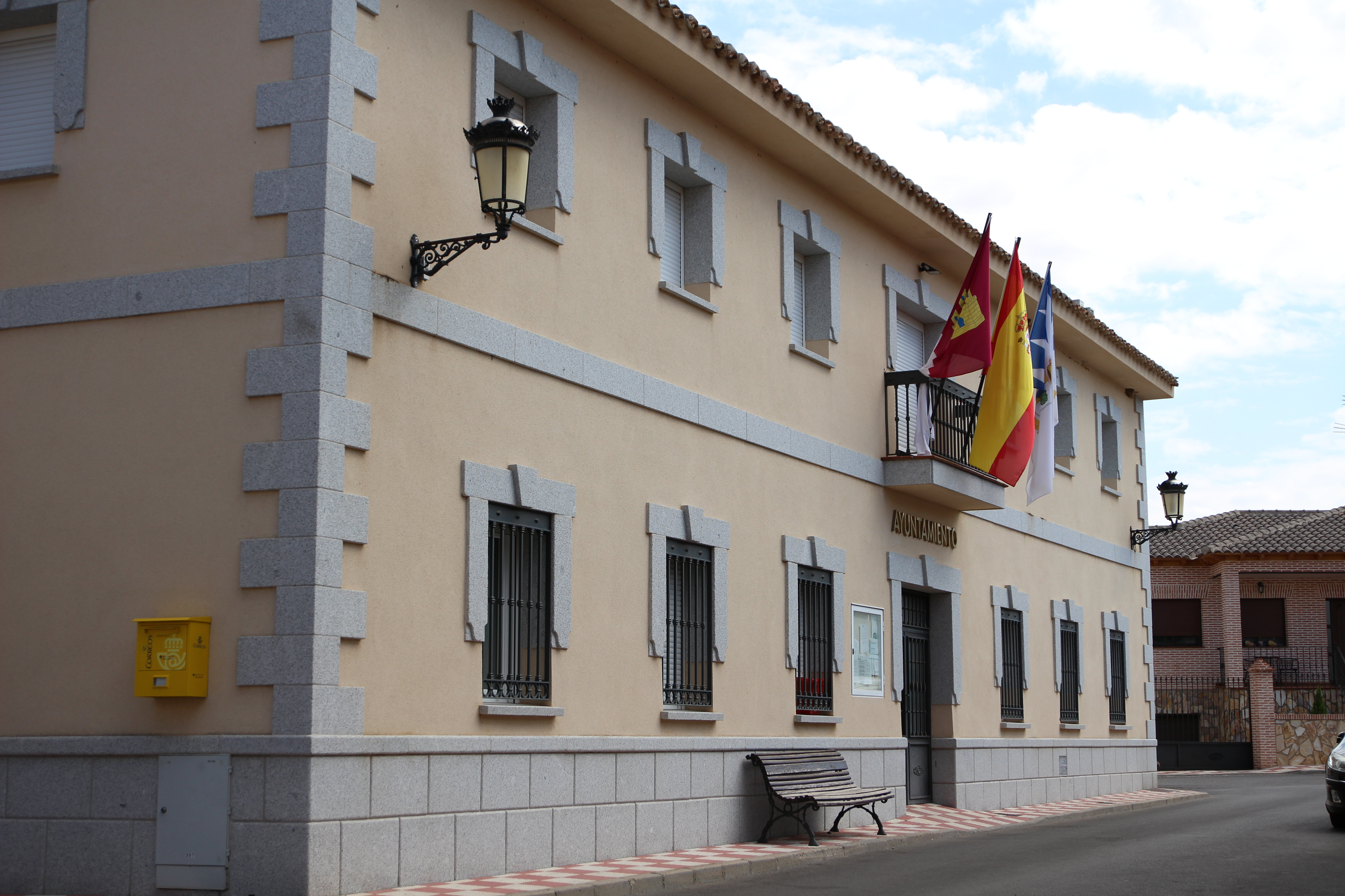 Ayuntamiento de Layos (Toledo)